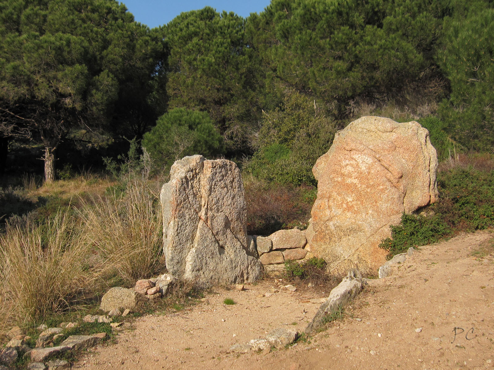 Dolmen situé à proximité du Cap Taillat (Ramatuelle)